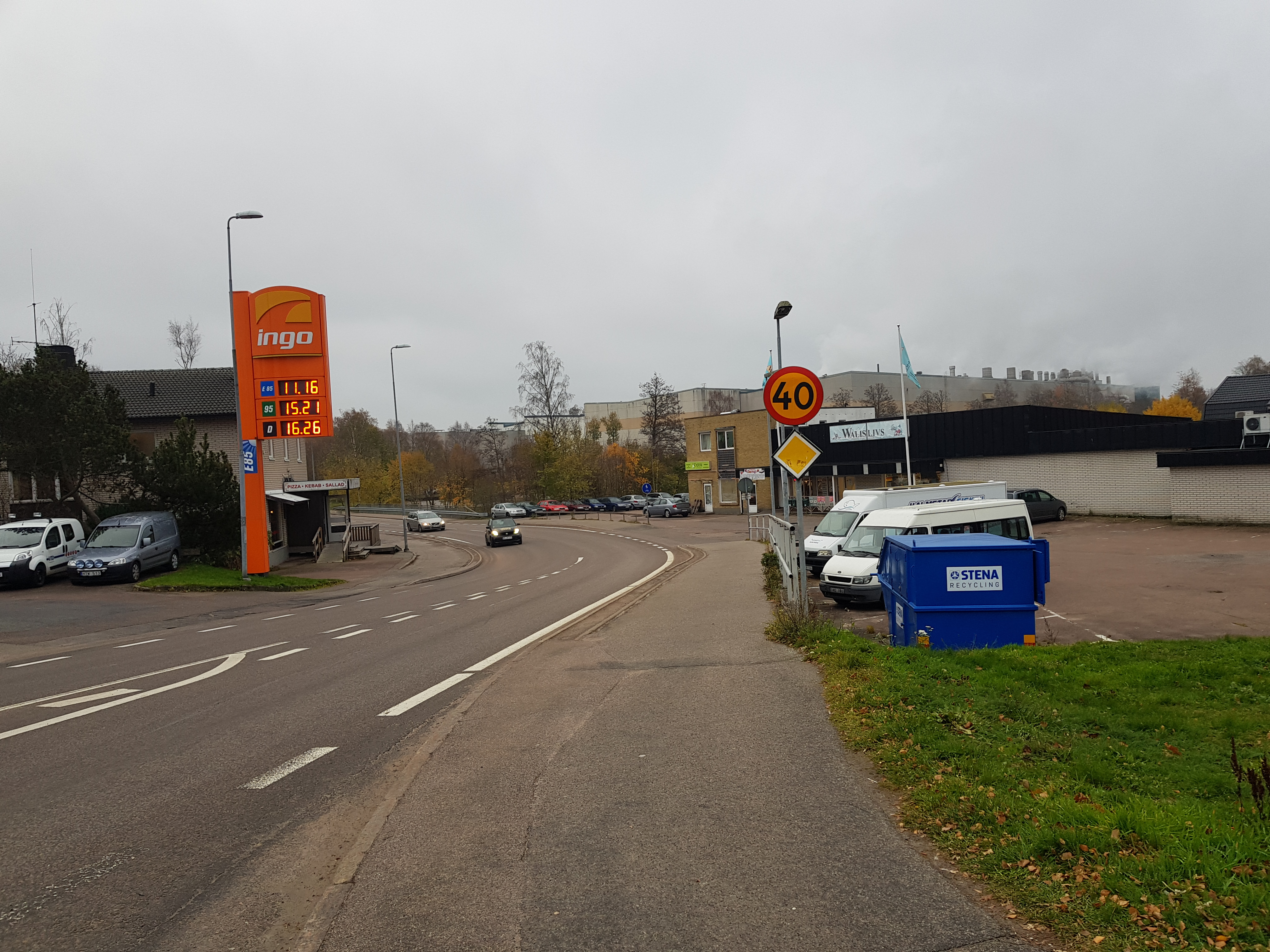 Väg i Hyltebruk. I fjärran syns rök från bruket.